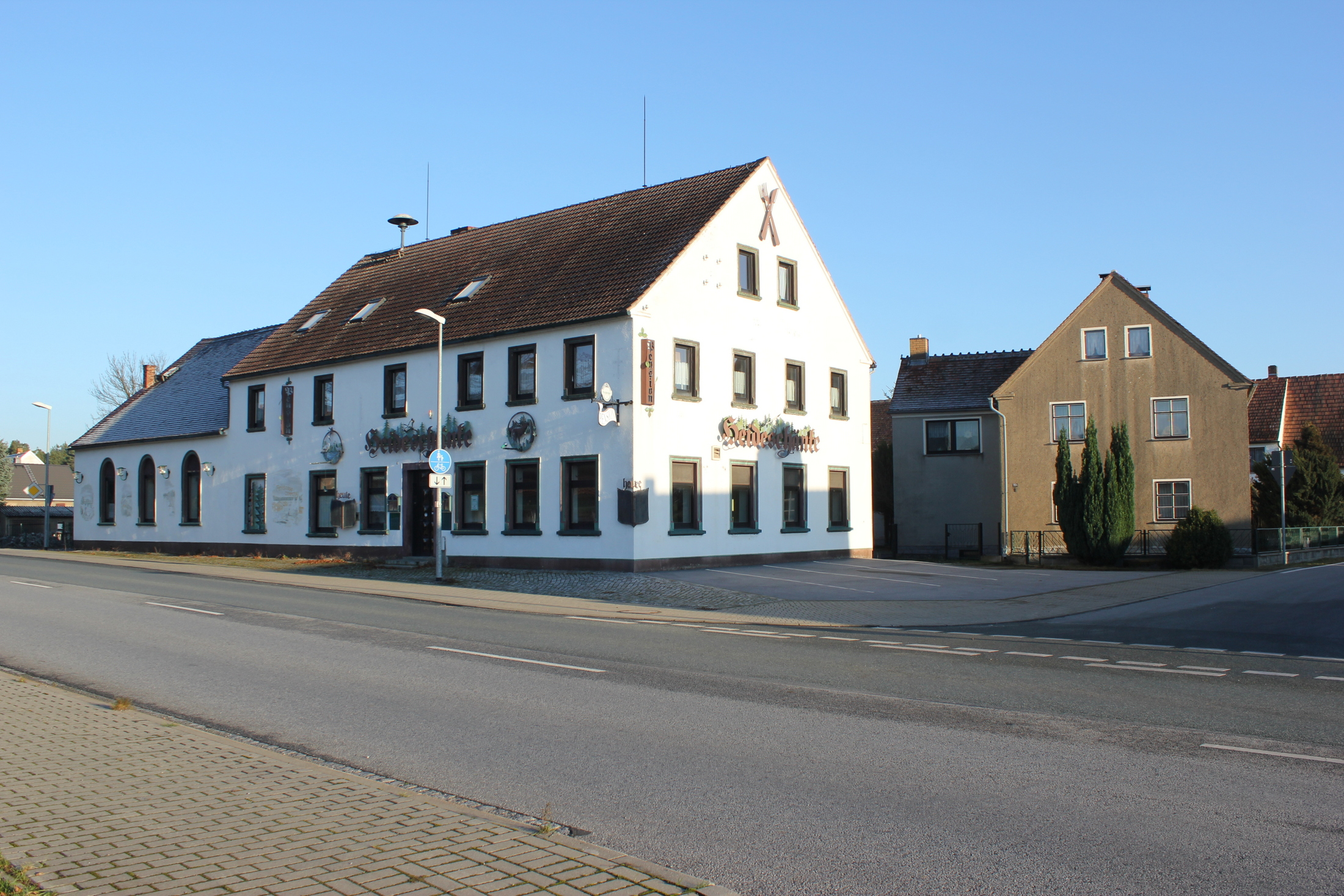 Hornjoserbsce: "Holanska korčma" w Komorowje (gmejna Wulka Dubrawa).